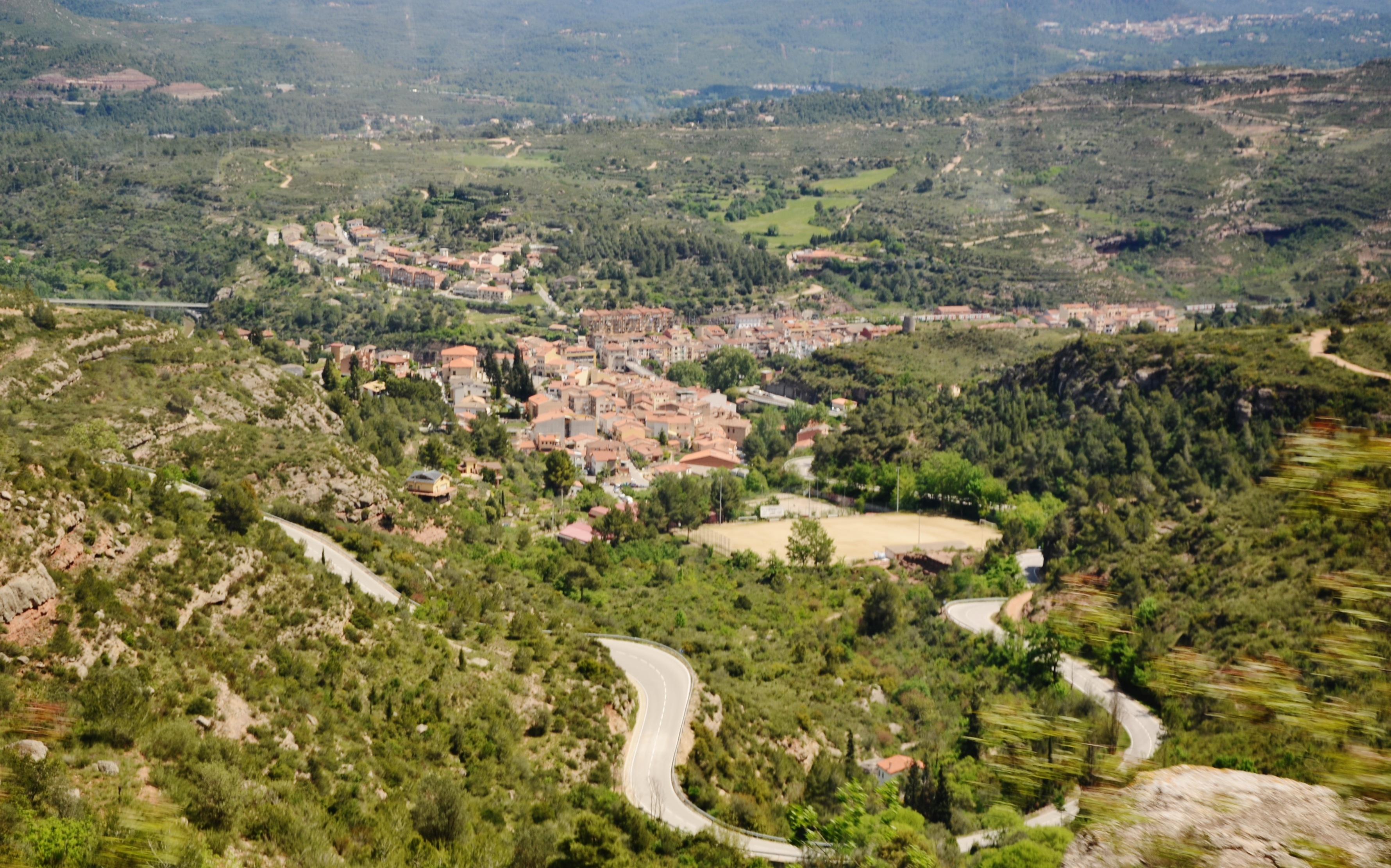 Monistrol de Montserrat This is a a photo of a natural area in Catalonia, Spain, with id: ES510139